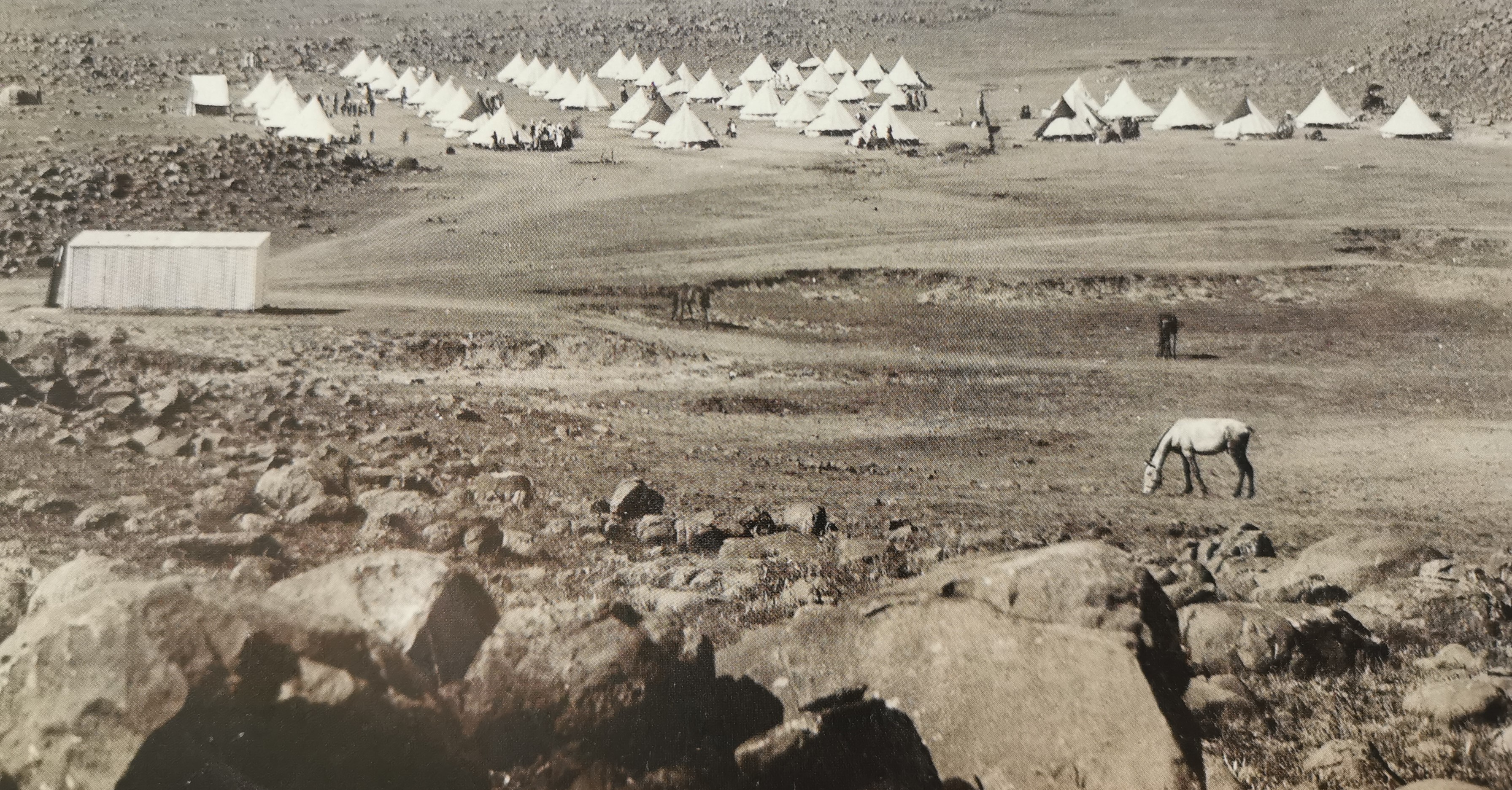 'n Gedeelte van die wit konsentrasiekamp by Bloemfontein. Foto: Oorlogsmuseum van die Boererepublieke.